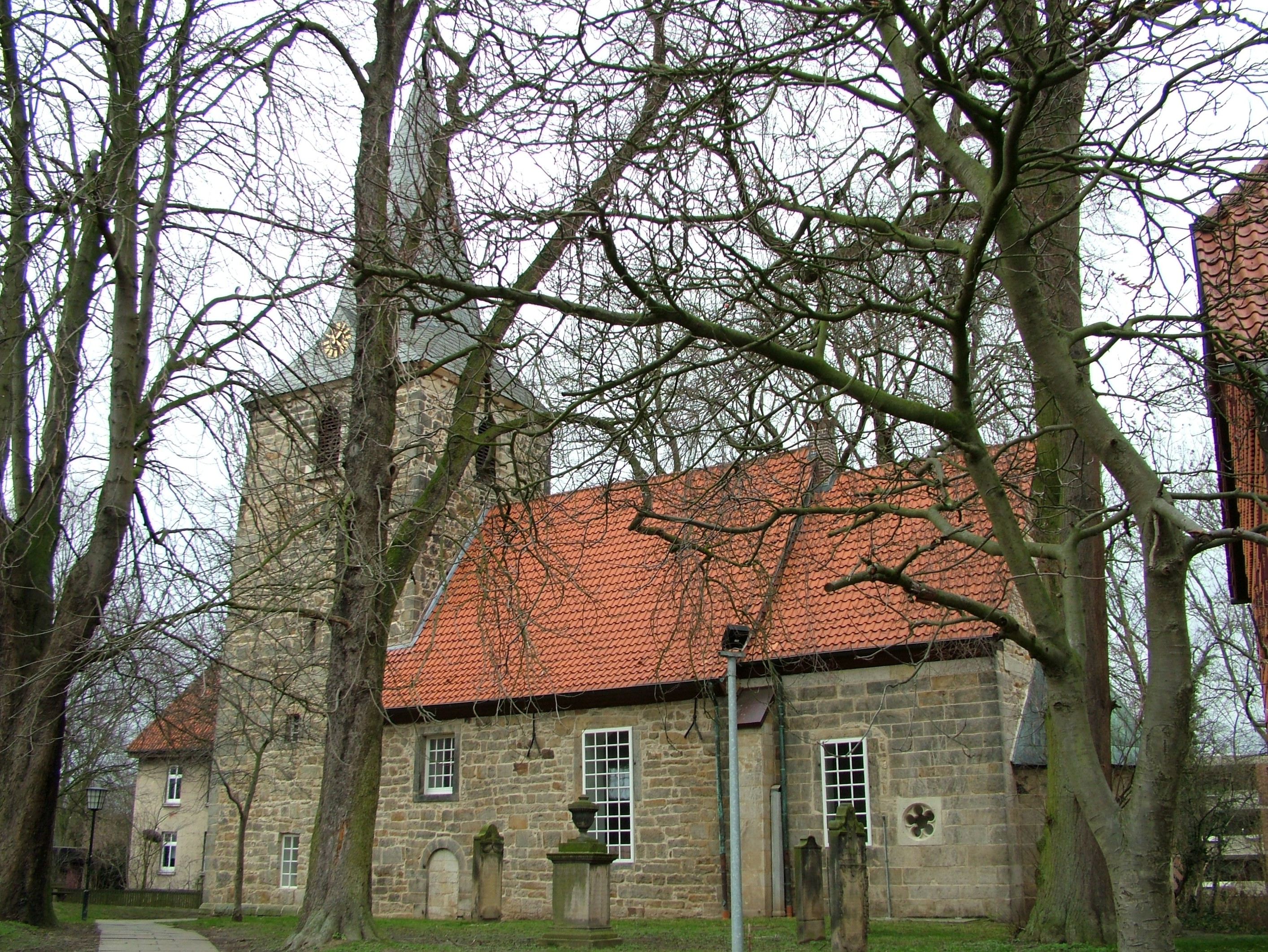 Hemmingen Ortsteil Hiddestorf, Nikolai-Kirche, Niedersachsen, Deutschland